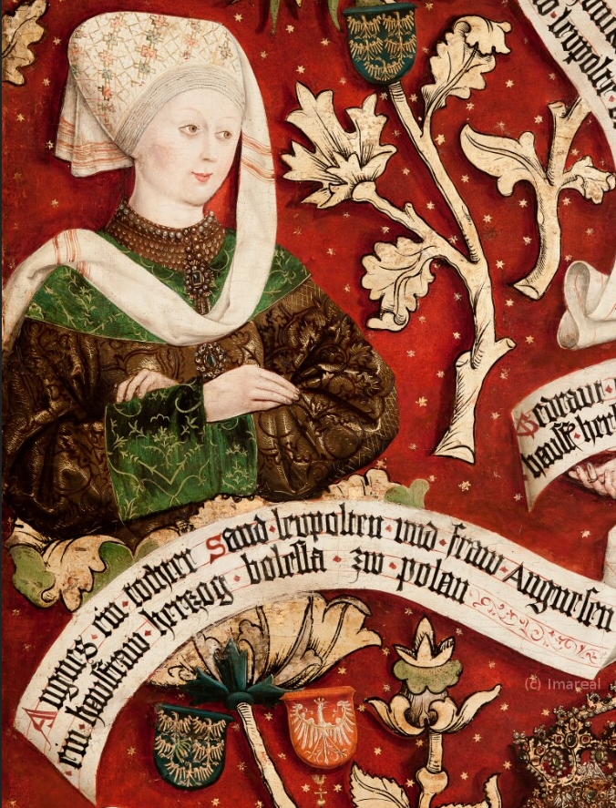 Agnieszka Babenberska